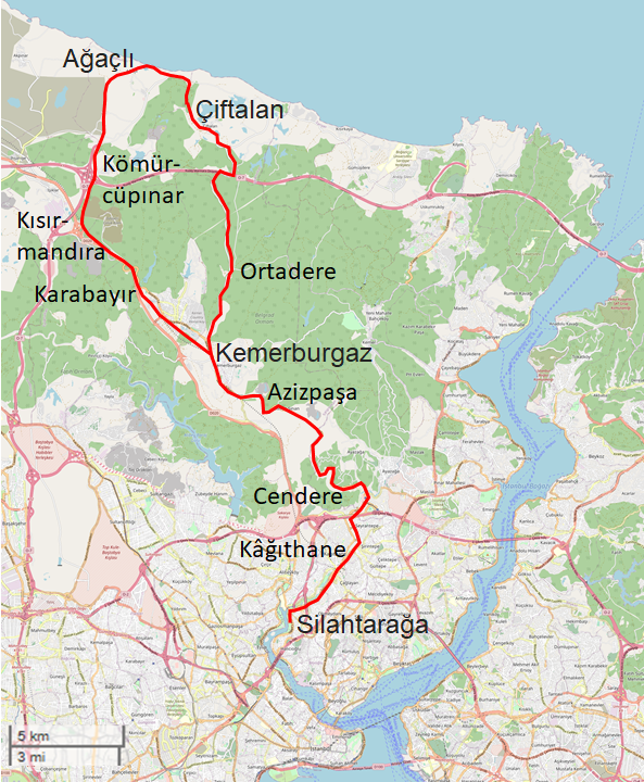 Haliç–Karadeniz Sahra Hattı